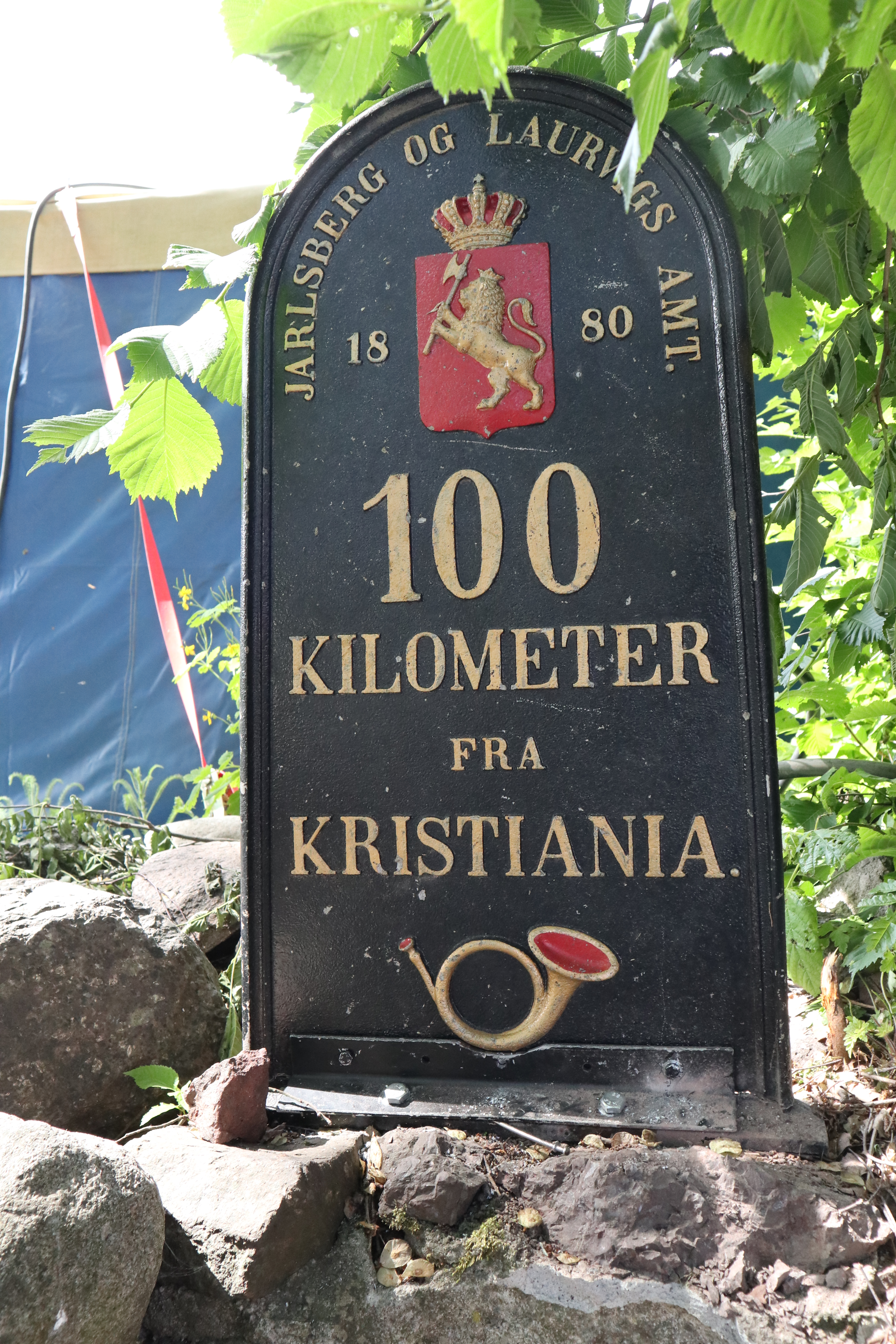 Milepæl i støpejern fra Vestfold